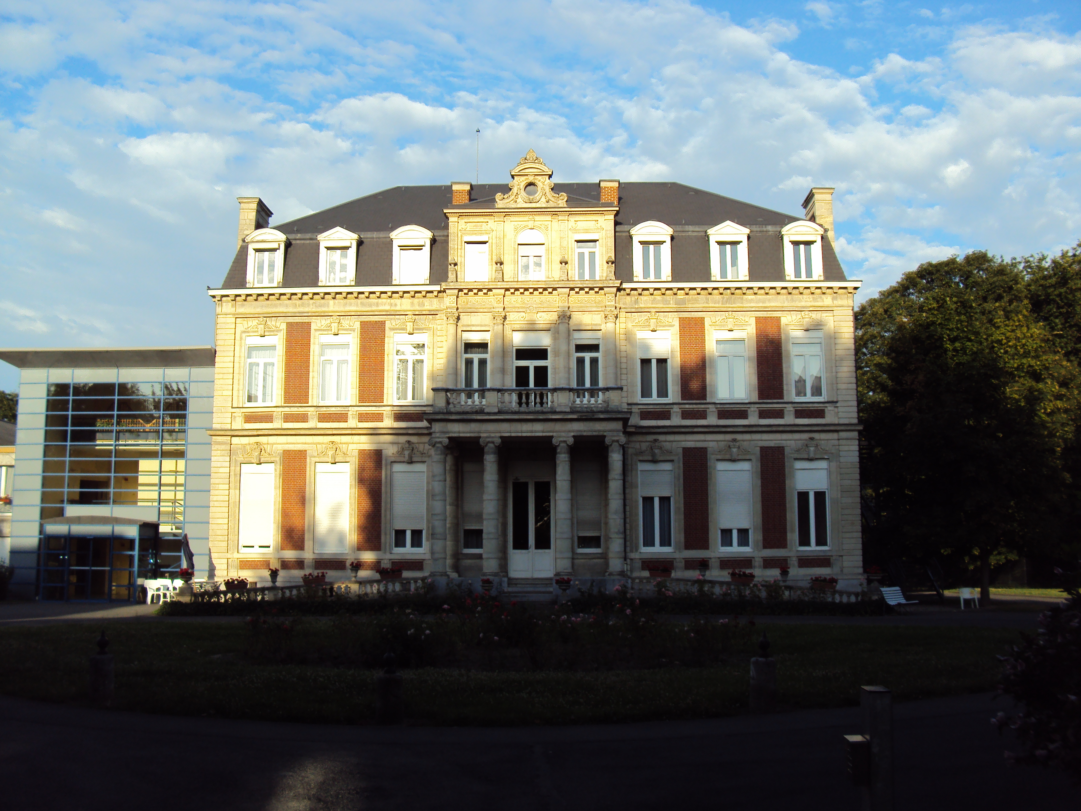 Château des Buissonnets à Lille (France)